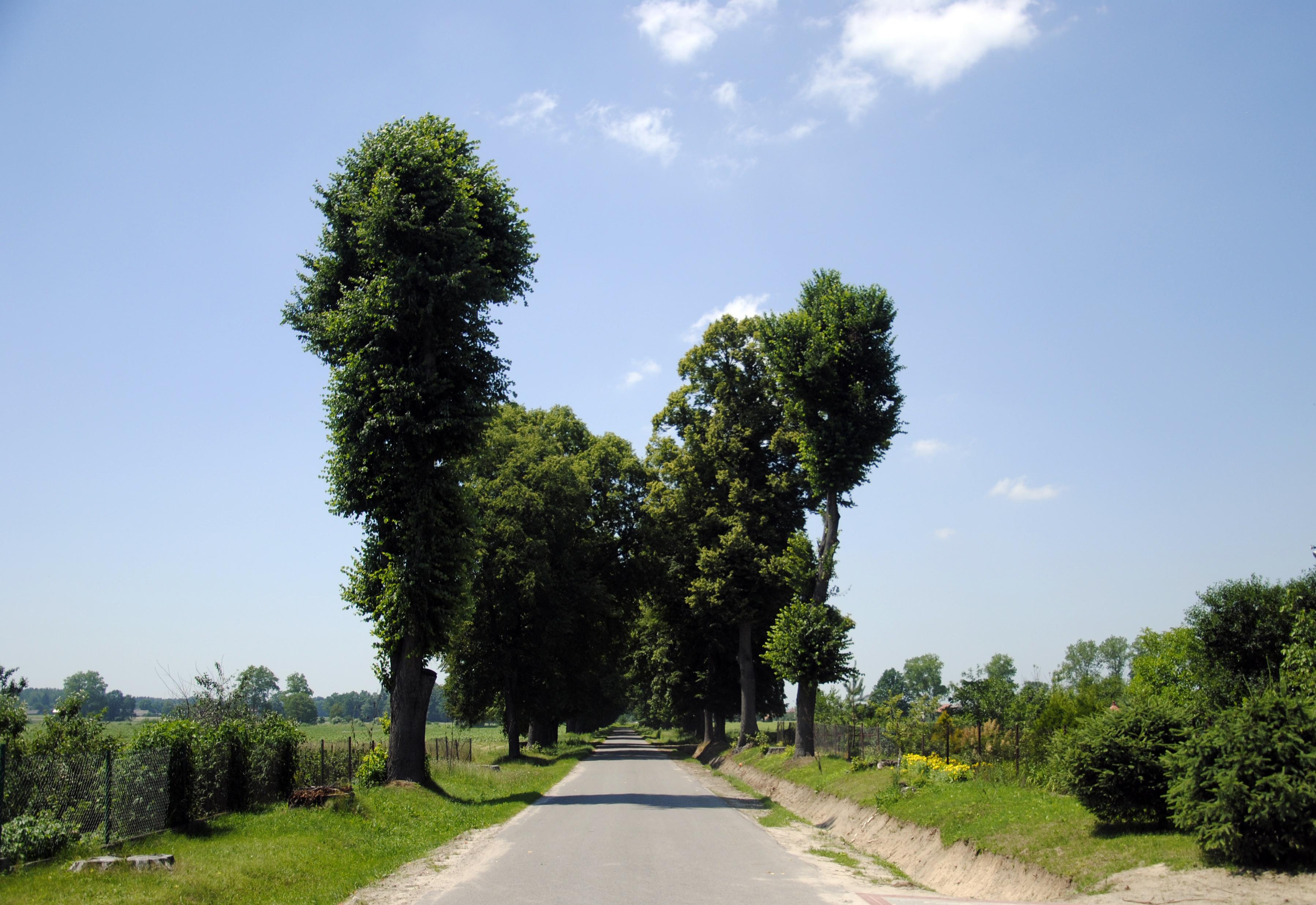 Aleja lipowa w Cieplicach Osada Izabelin